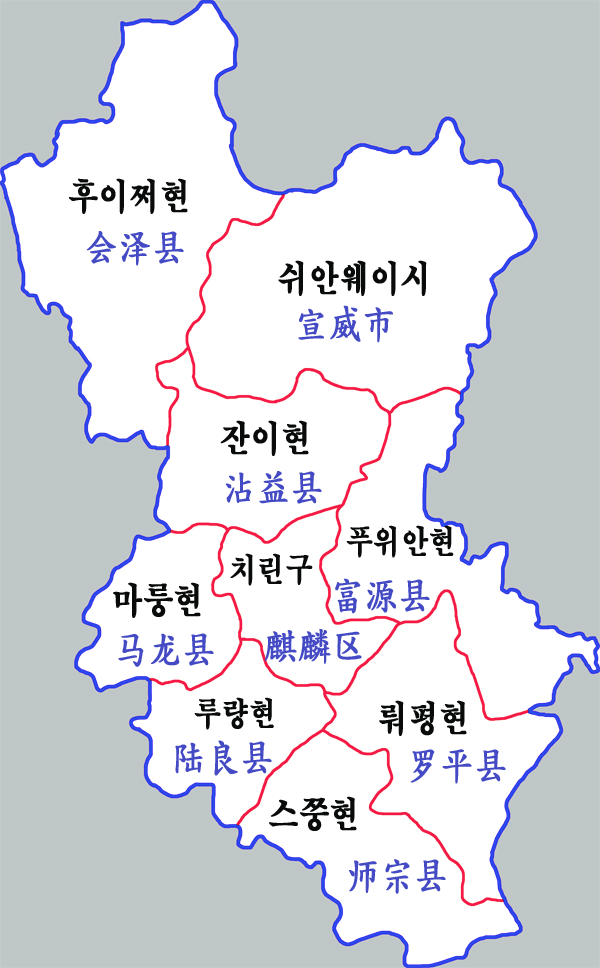 취징시 현급구역도